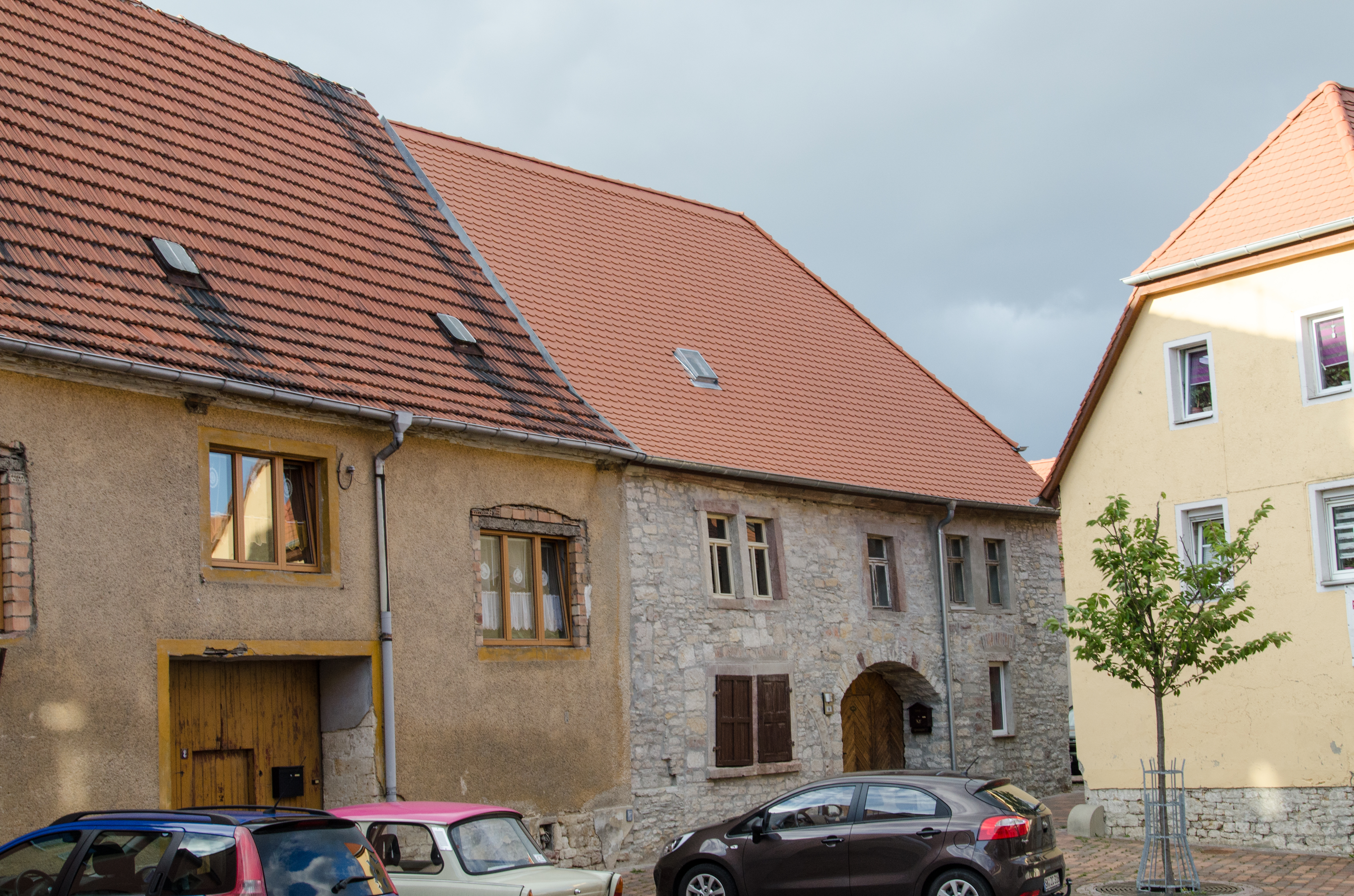 Querfurt, Lederberg 6